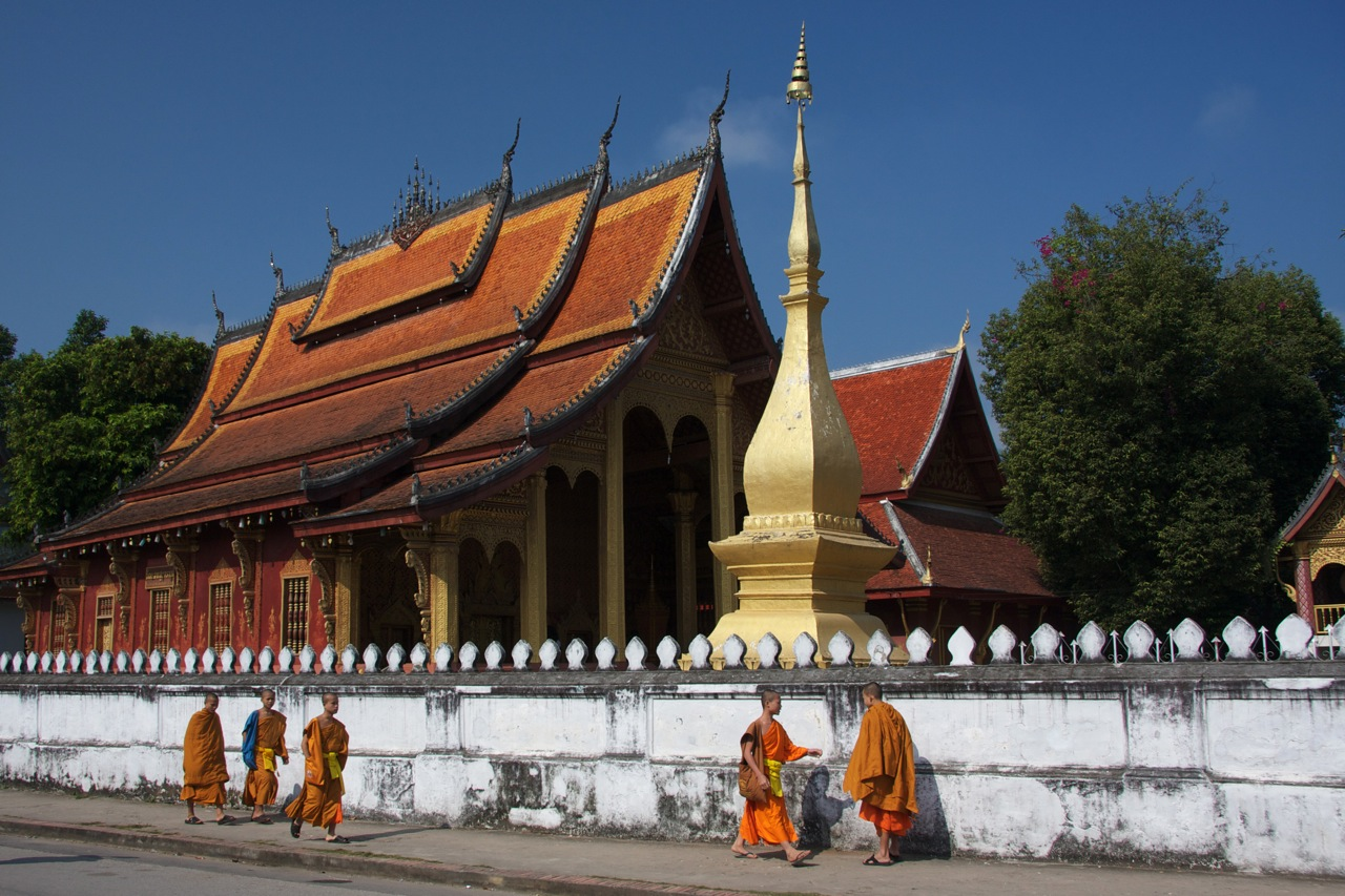 Buddhist Temple in Luang Prabang, Laos